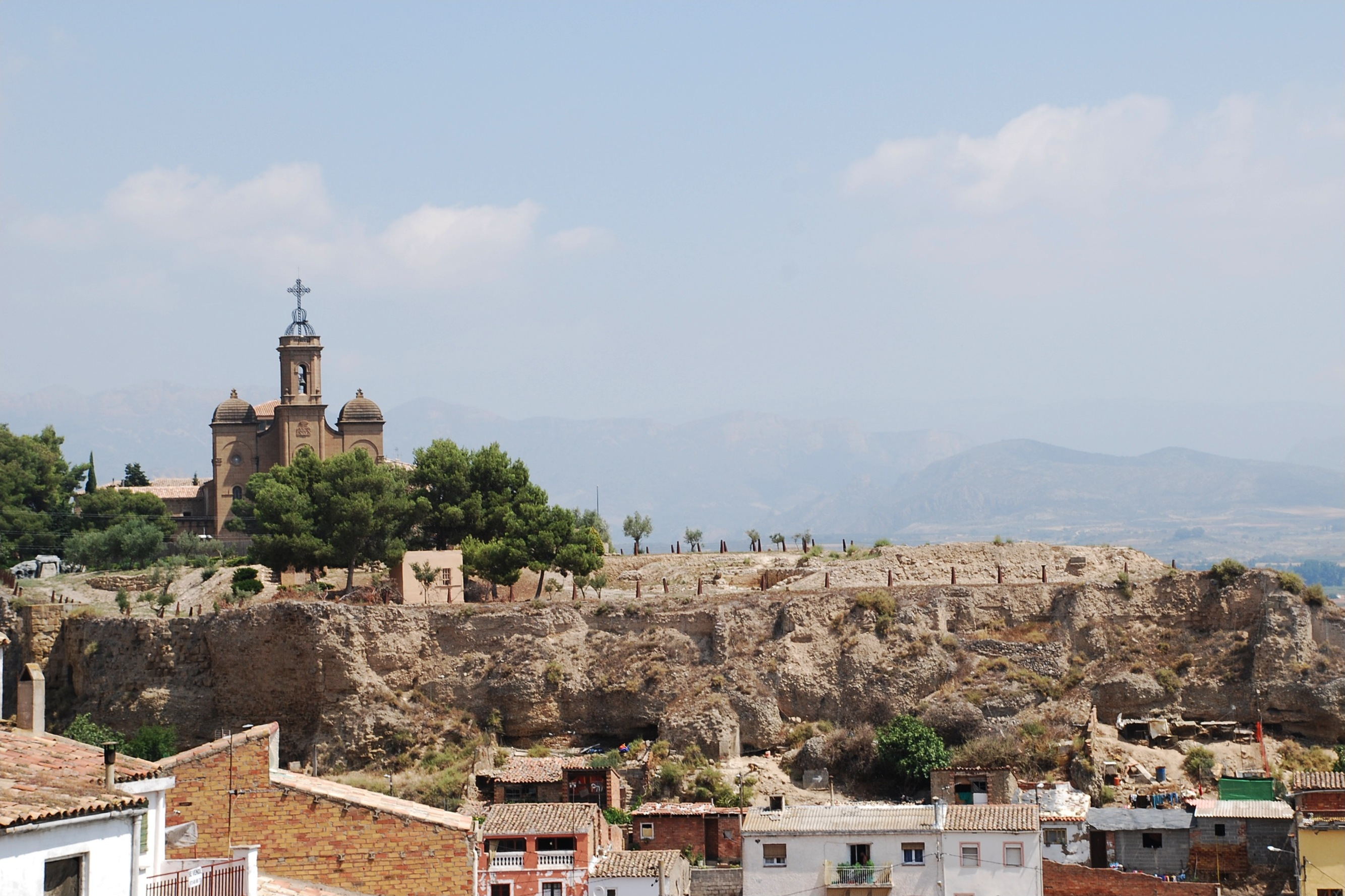 Castillo de Formós y santuario del Santo Cristo en Balaguer (Lérida)